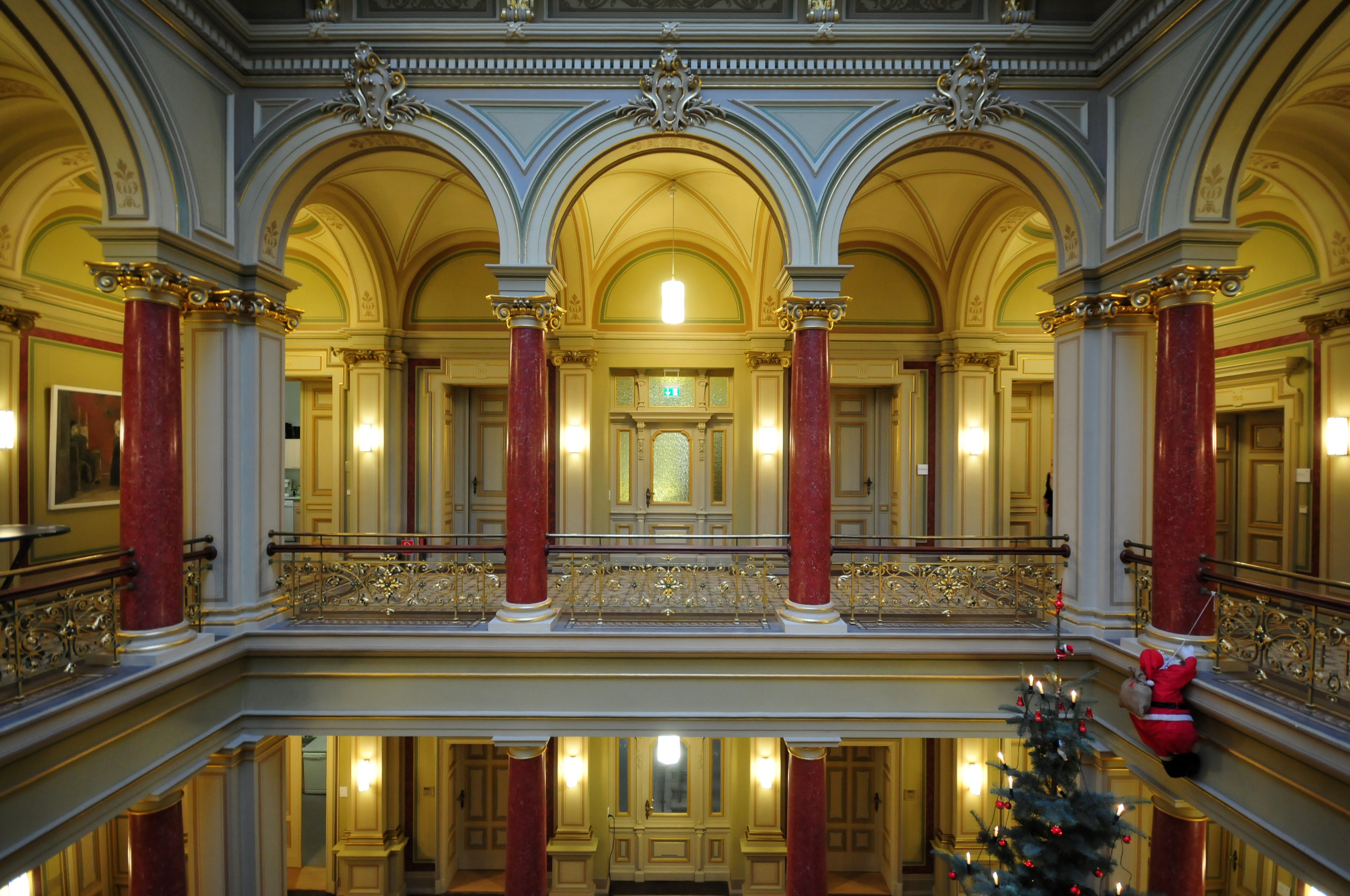 Staatskanzlei Sachsen-Anhalt im Palais am Fürstenwall Wikipedia im Landtag – Sachsen-Anhalt 13./14. Dezember 2012 in MagdeburgDieses Foto wurde im Rahmen des Projektes „Wikipedia im Landtag“ erstellt. The making of this document was supported by the Community-Budget of Wikimedia Germany. The making of this work was supported by Wikimedia Austria. For other files made with the support of Wikimedia Austria, please see the category Supported by Wikimedia Österreich.